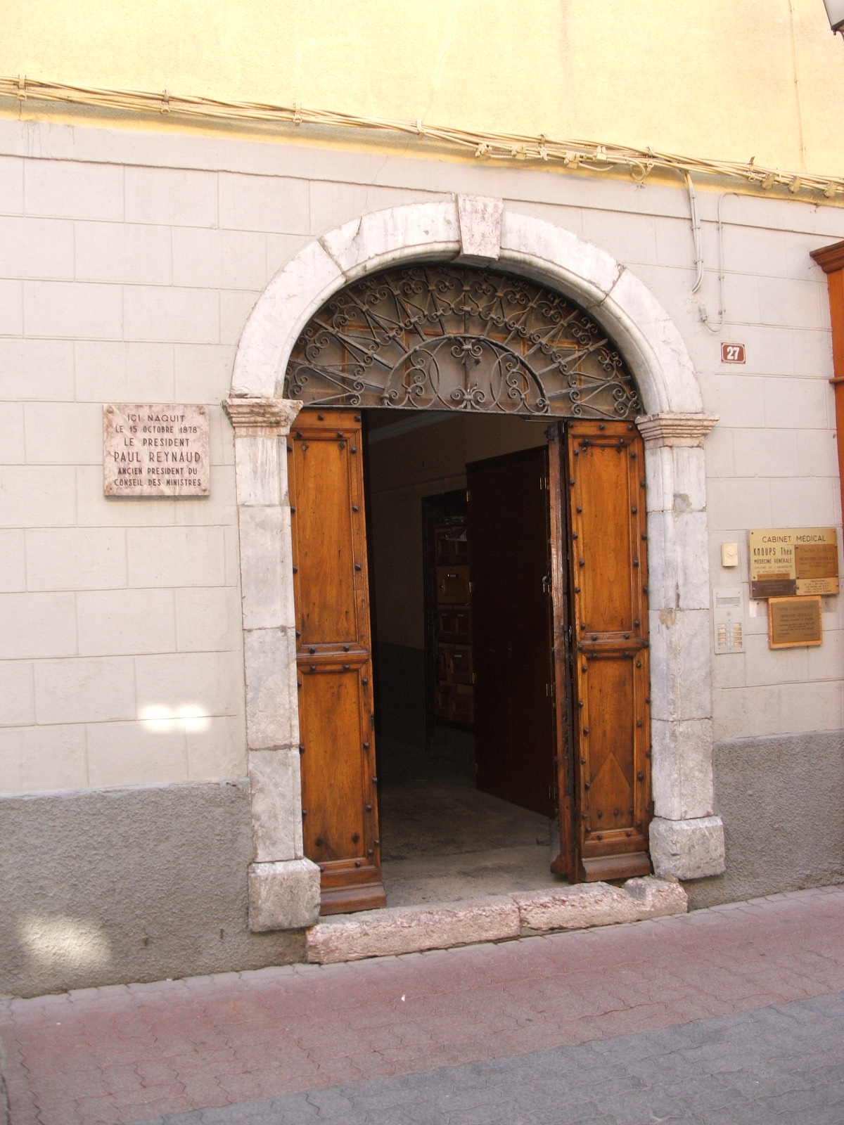 Barcelonnette, département des Alpes-de-Haute-Provence, France